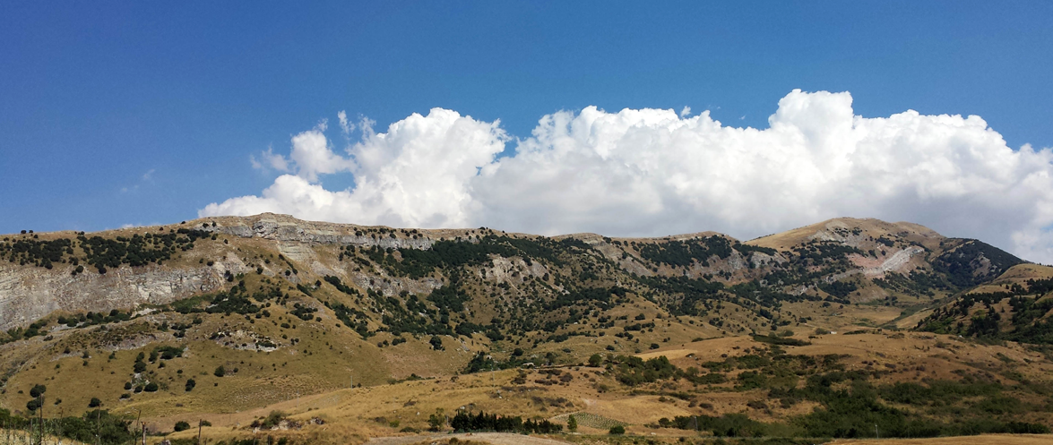 Vista occidentale di M. Barraù